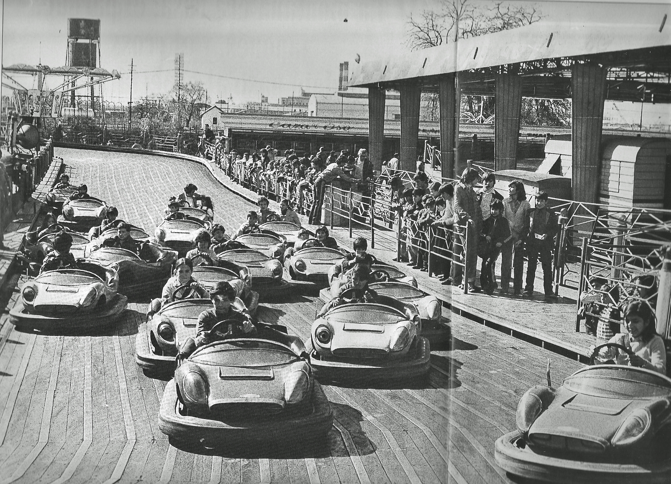 Pista de autos en el Italpark de Buenos Aires, Argentina